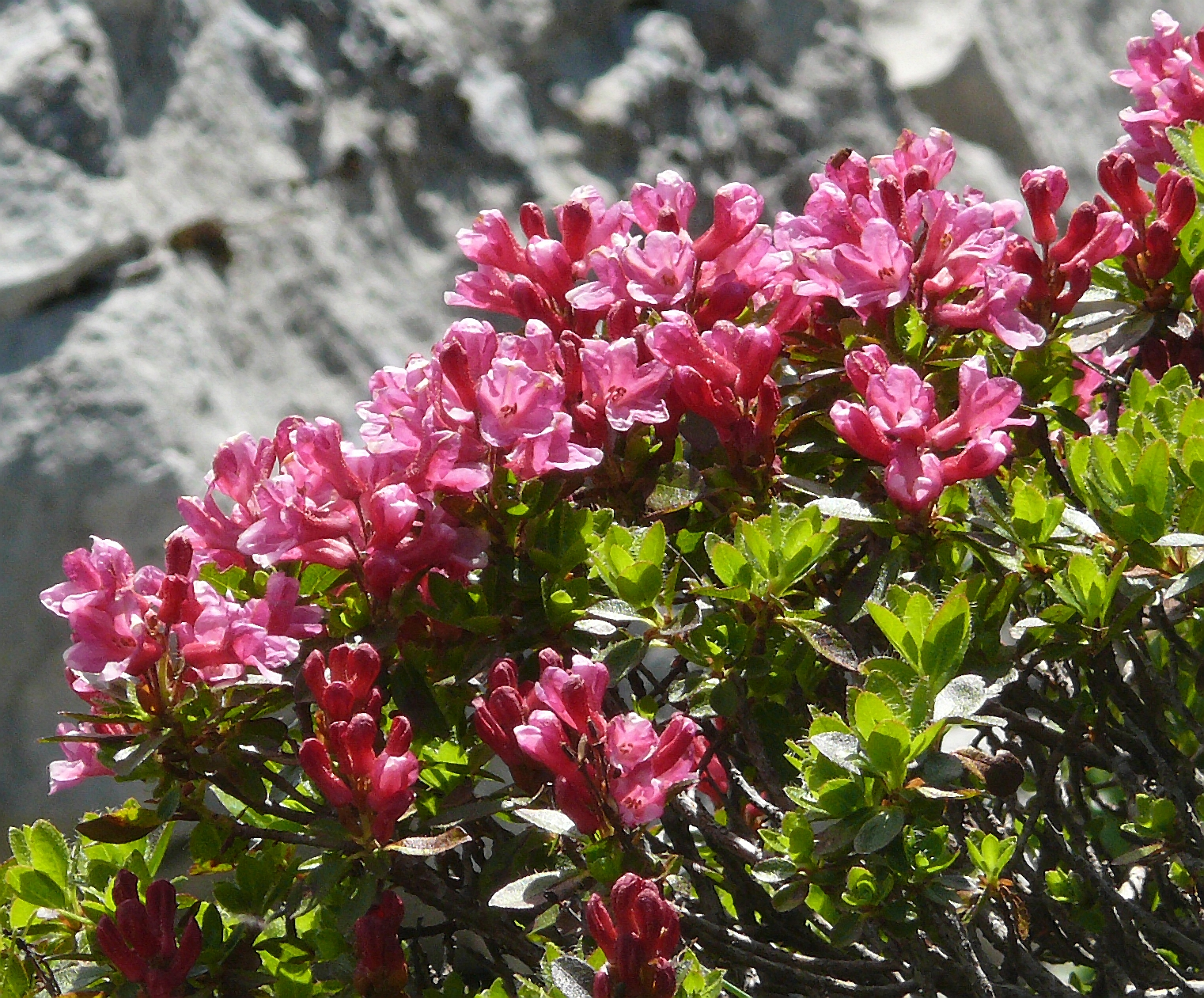 Rhododendron hirsutum, Allgäuer Alpen, Österreich